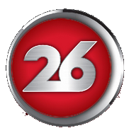 Nuevo Logo de Canal 26